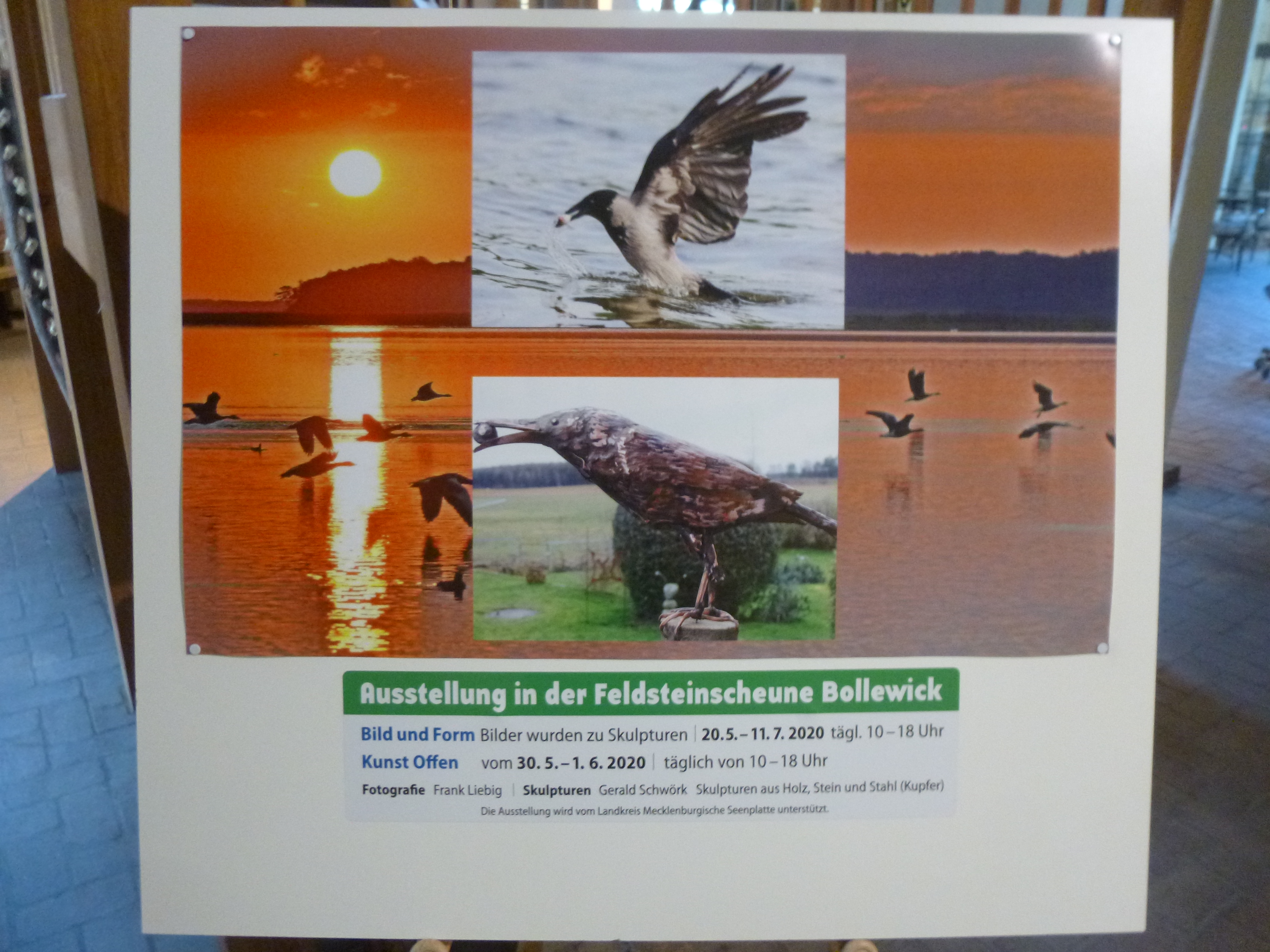 Ausstellungsposter für Frank Liebig und Gerald Schwörk in der Scheune Bollewick